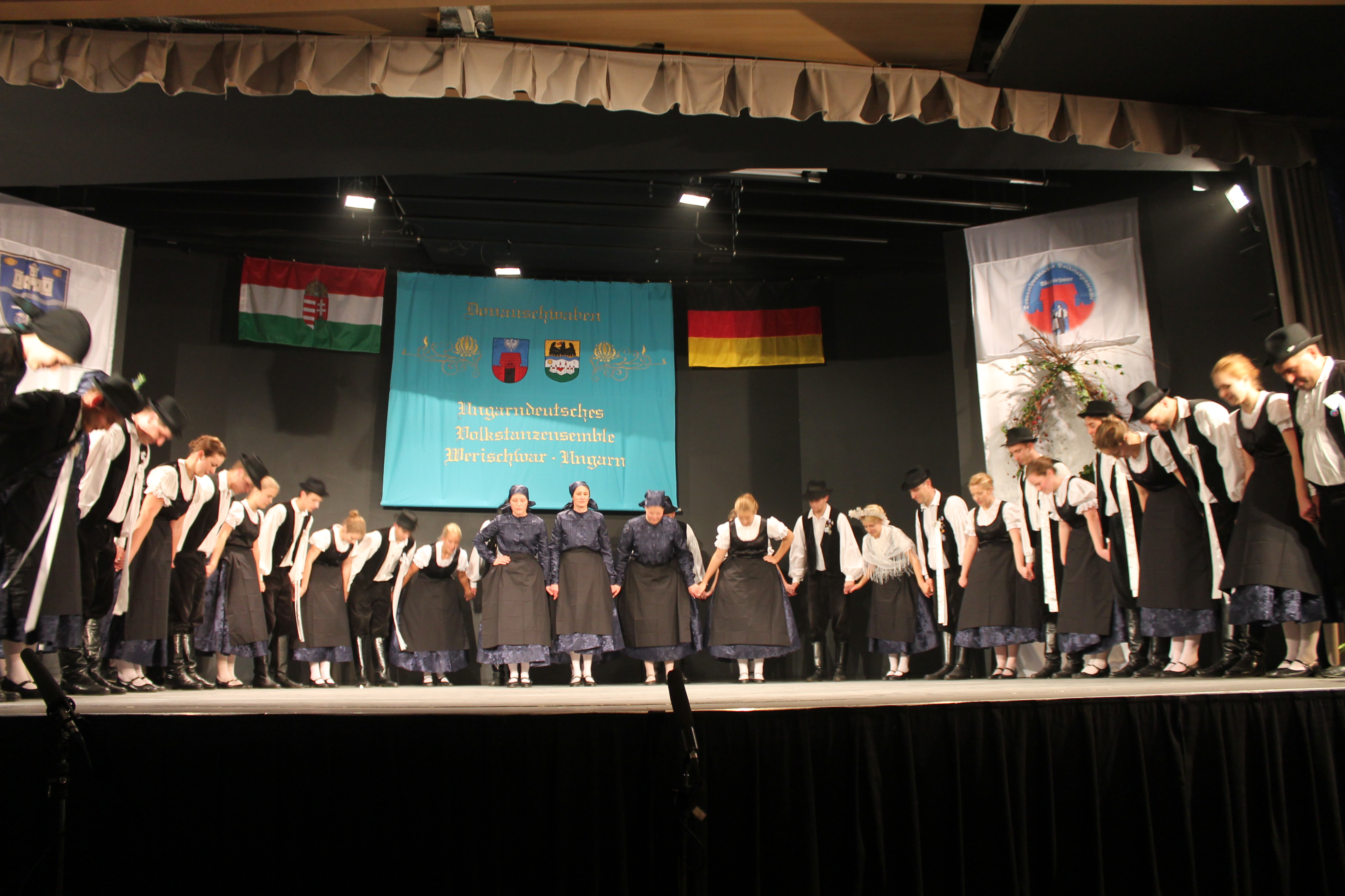 A Pilisvörösvári Német Nemzetiségi Táncegyüttes megalakulásának 60. évfordulóján